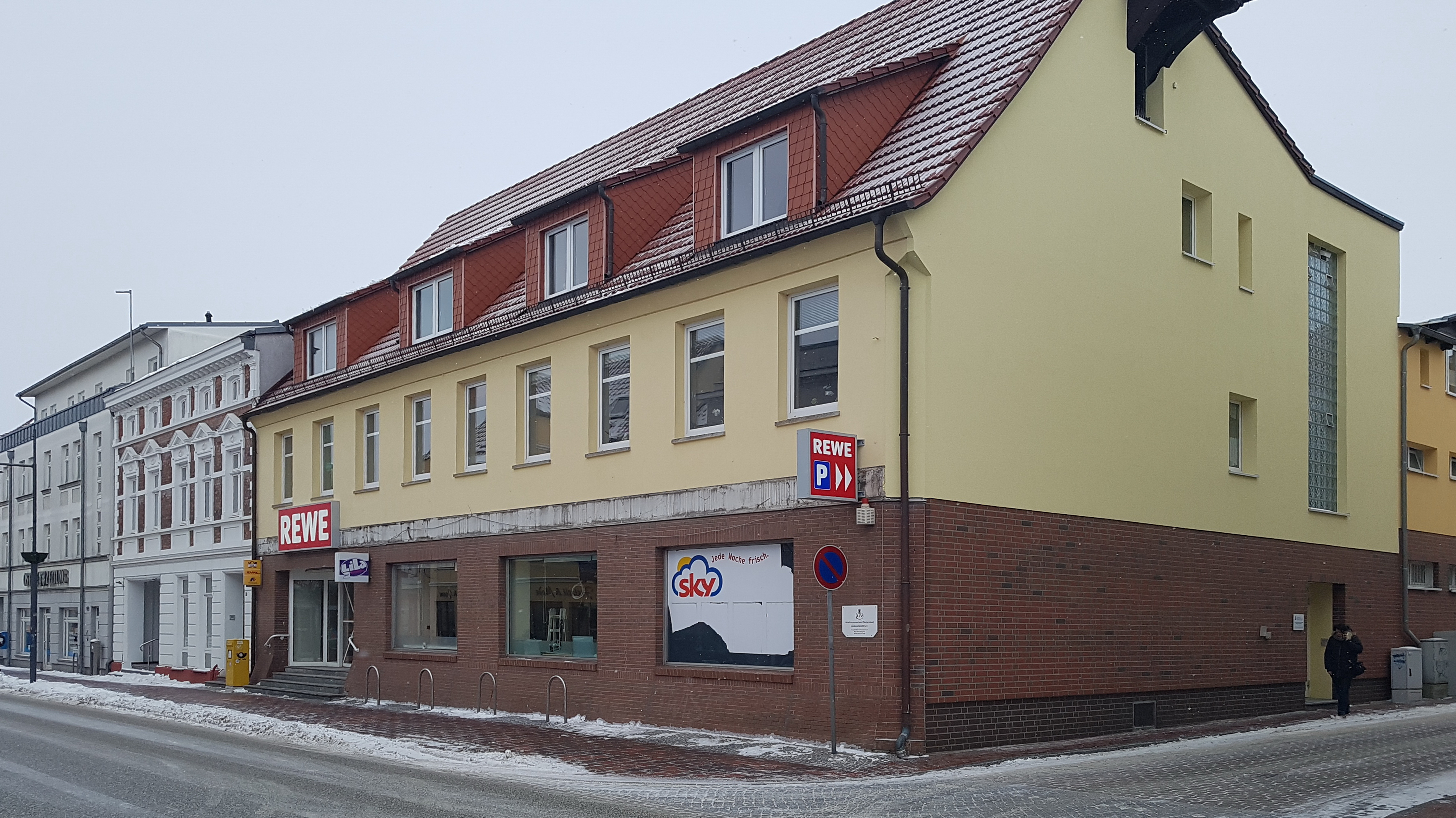 Im Umbau befindlicher Sky-Markt in Ribnitz-Damgarten, welche im Zuge des Umbaus auch auf die Marke REWE umgeflaggt wird.